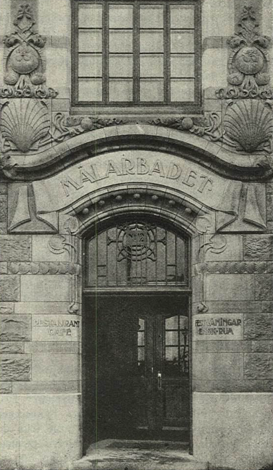 Portalen till Mälarbadet på Norr Mälarstrand 12 på Kungsholmen i Stockholm. Badet invigdes den 17 mars 1906. Byggmästare var Wilhelm Carlson efter ritningar av arkitekt Victor Bodin.